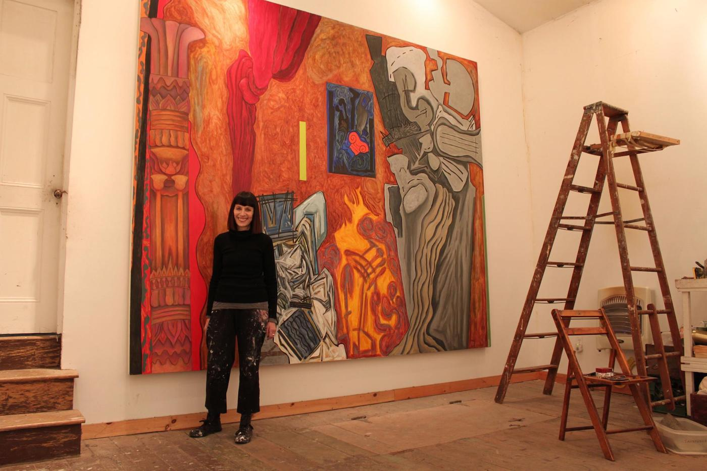 Retrato de Stephanie Rose en su estudio